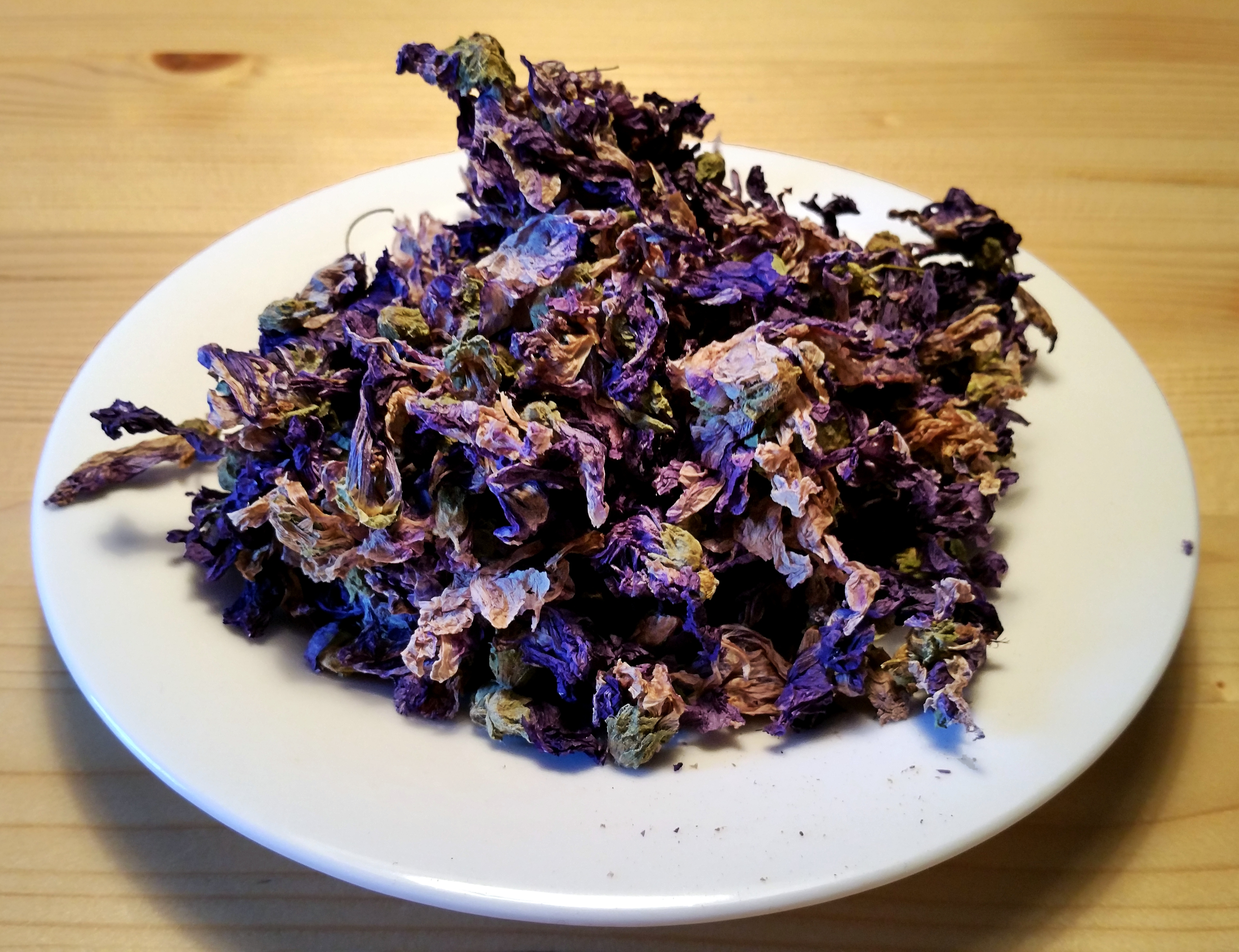 Malvenblüten, groß, getrocknet, 11 Gramm